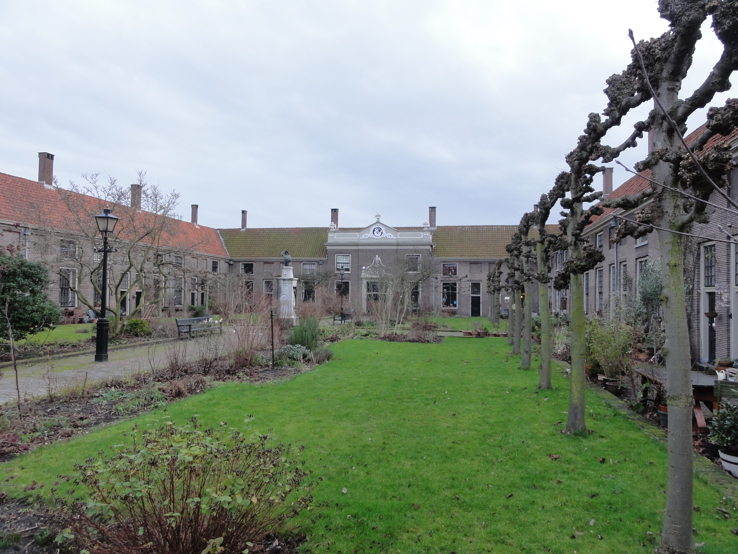 Meermansburg- of Meermanshofje aan de Oude Vest 159 te Leiden